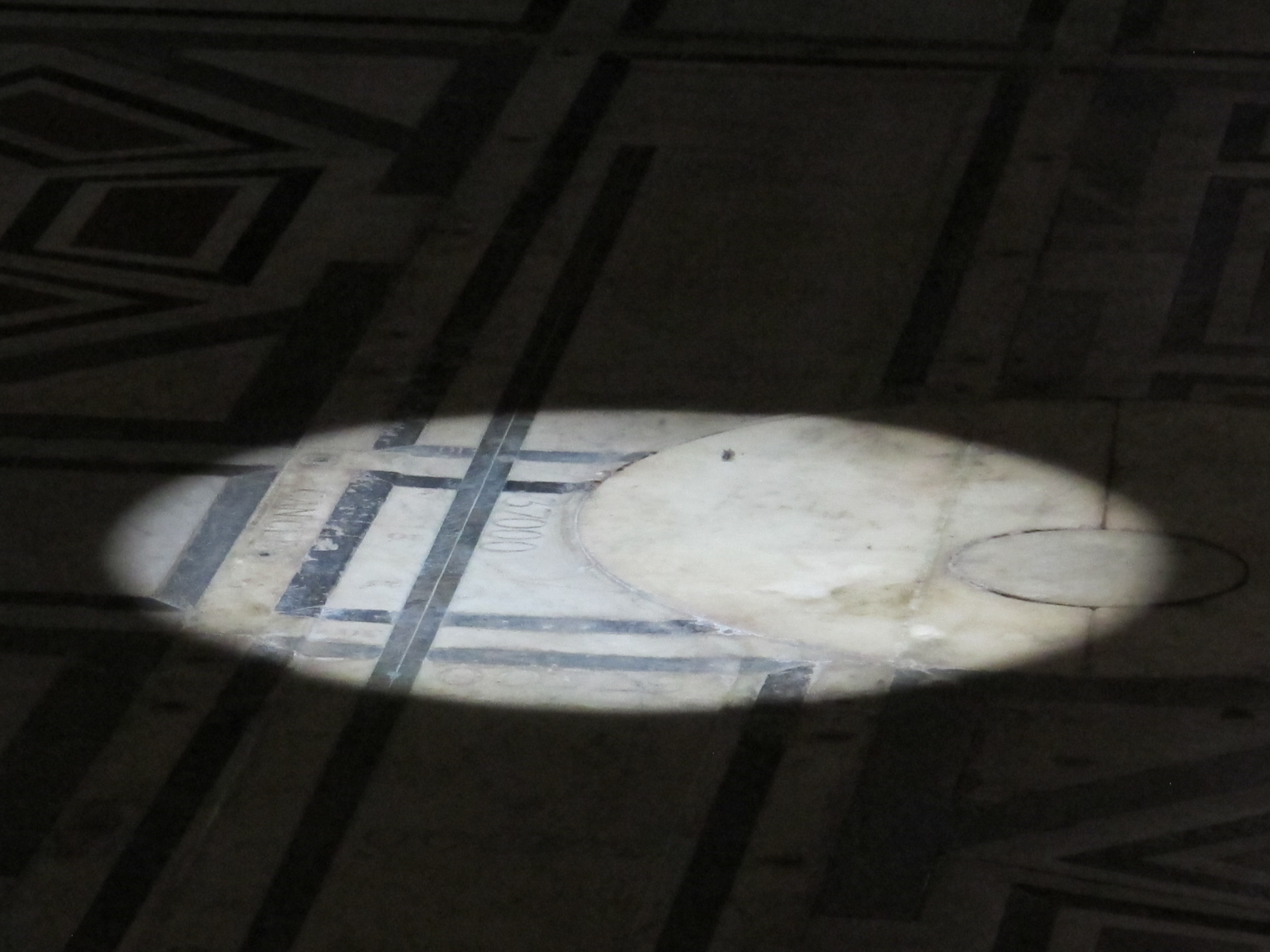 Osservazione del solstizio 21.06.12, fi